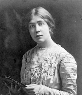 Estelle Sylvia Pankhurst Date 1909 Source Museum of London [1] Transferred from en.wikipedia to Commons. by Alberia torkenkluvin at 22:17, 22 March 2005. Filename was MID_0330001169_5mb.jpg. Auteur Photographe inconnu